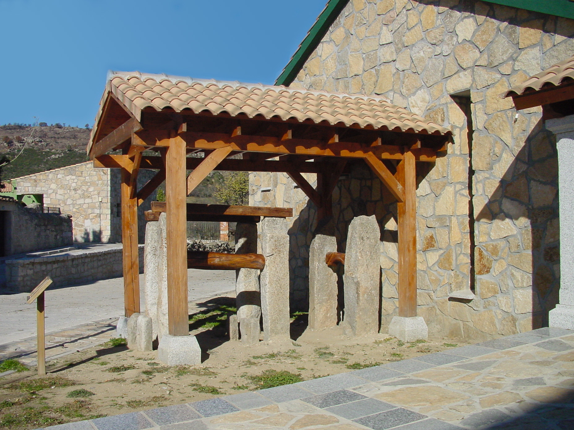 Casa con potro en Navalafuente.